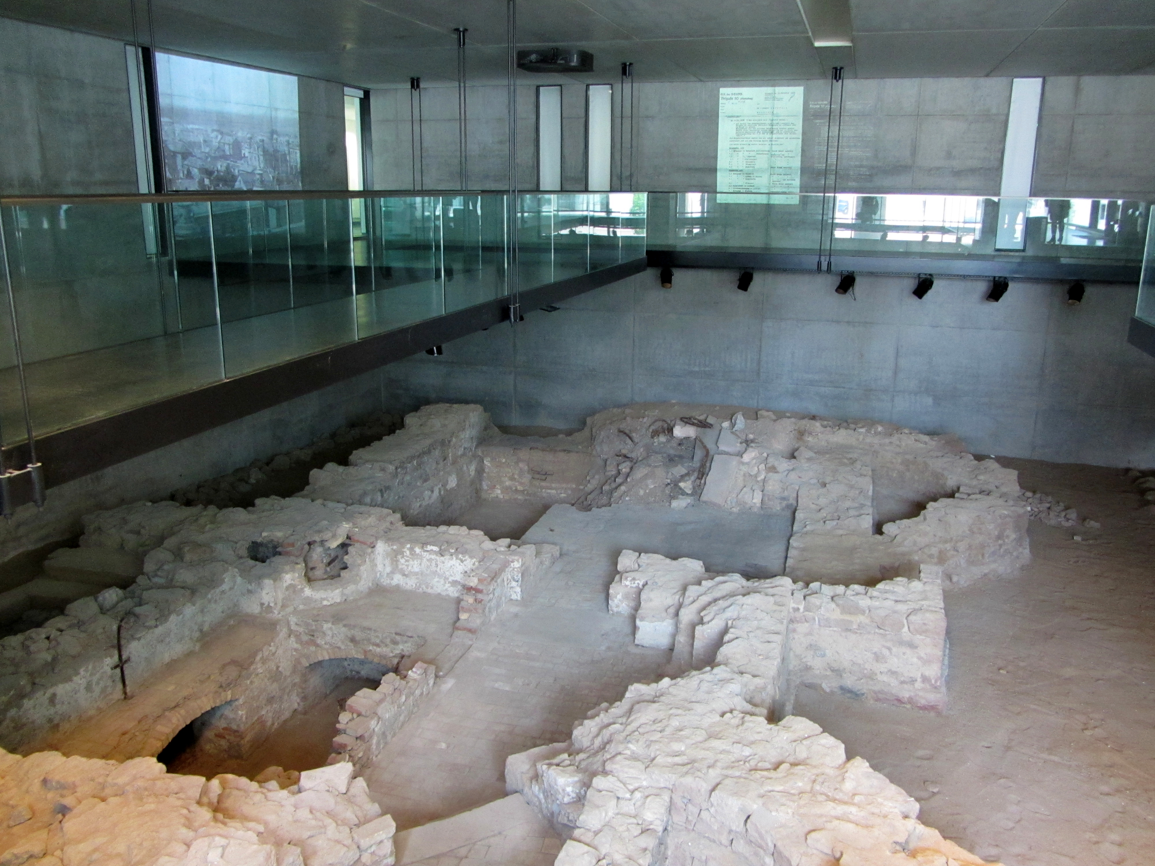 Erinnerungsstätte Liberale Synagoge Darmstadt